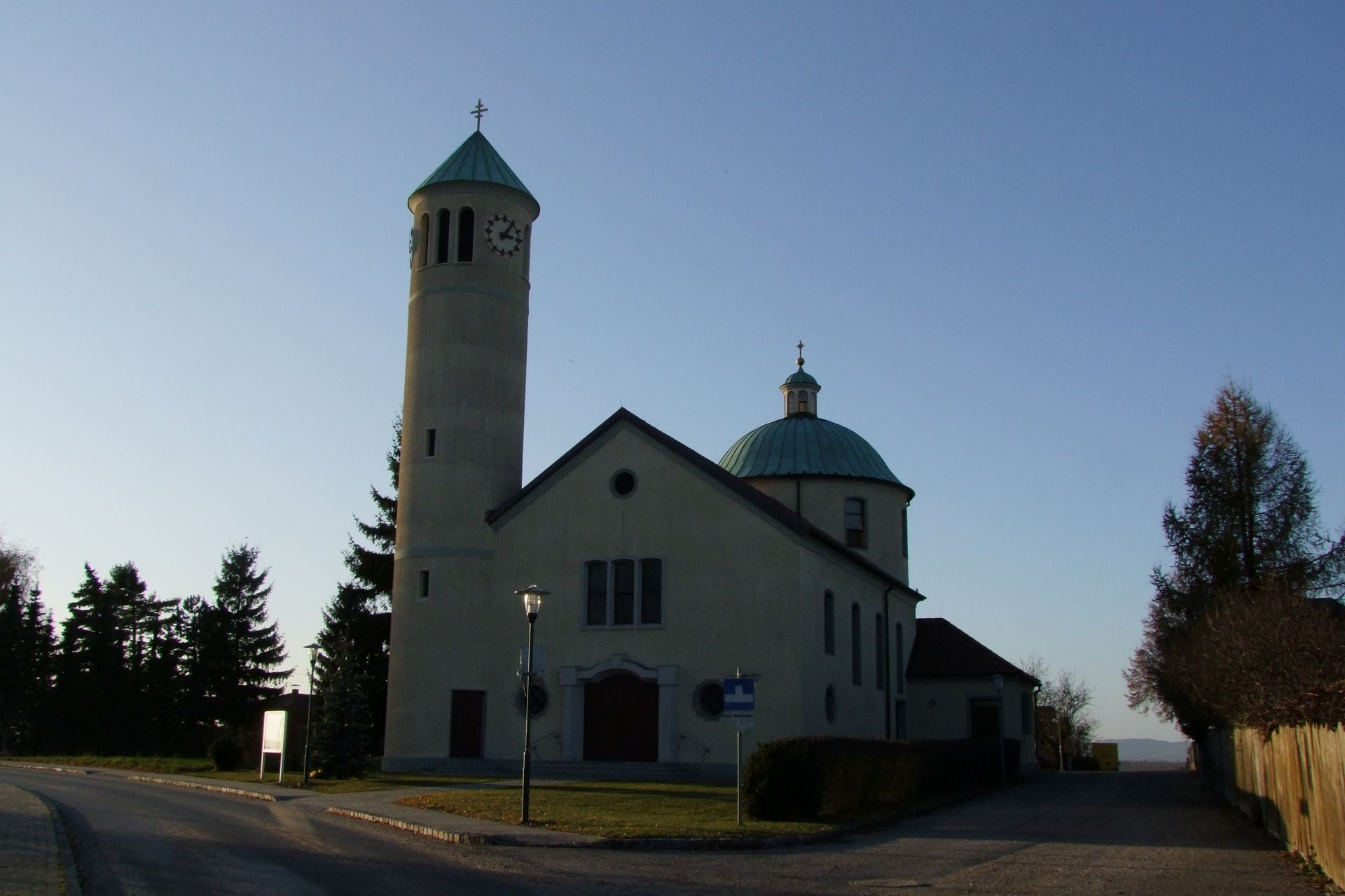 Kath. Filialkirche hl. Dreifaltigkeit, Neubau, Ladendorf.